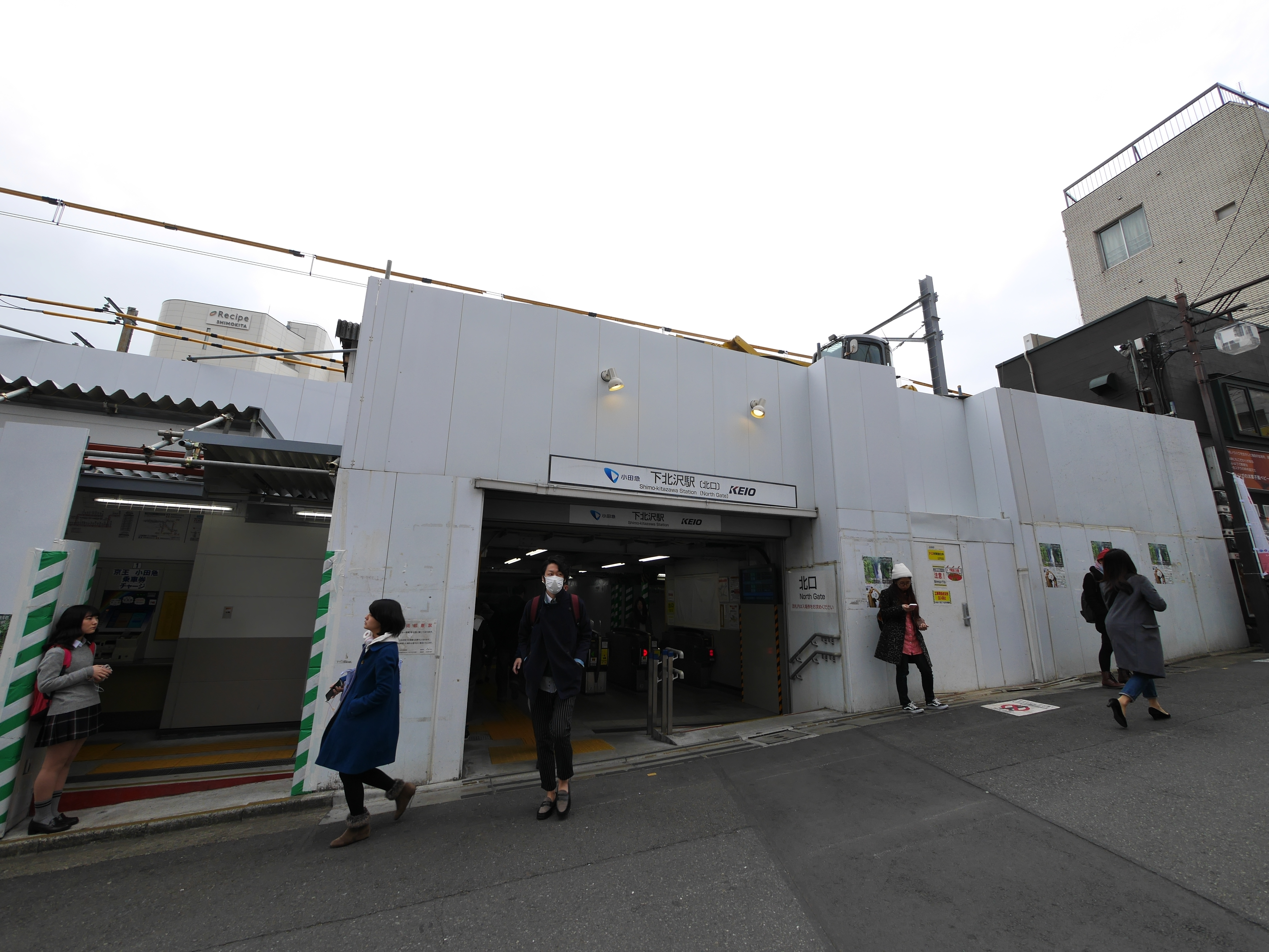 2 Chome Kitazawa, Setagaya-ku, Tōkyō-to 155-0031, Japan